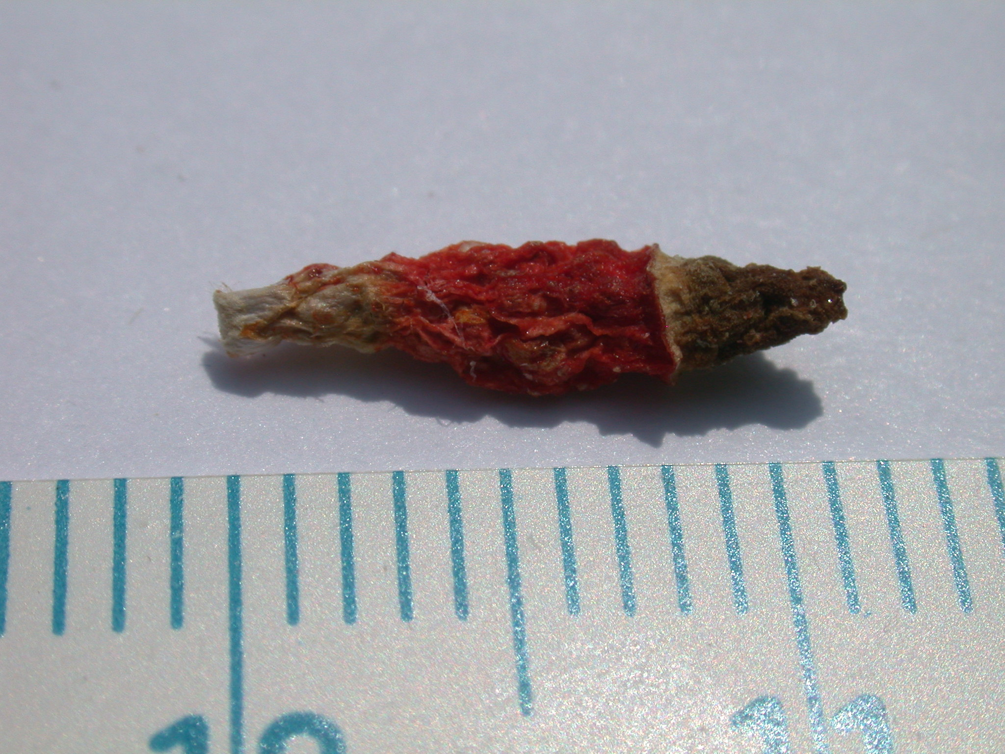 Plod Mammillaria multidigitata. Praha, Česká republika.